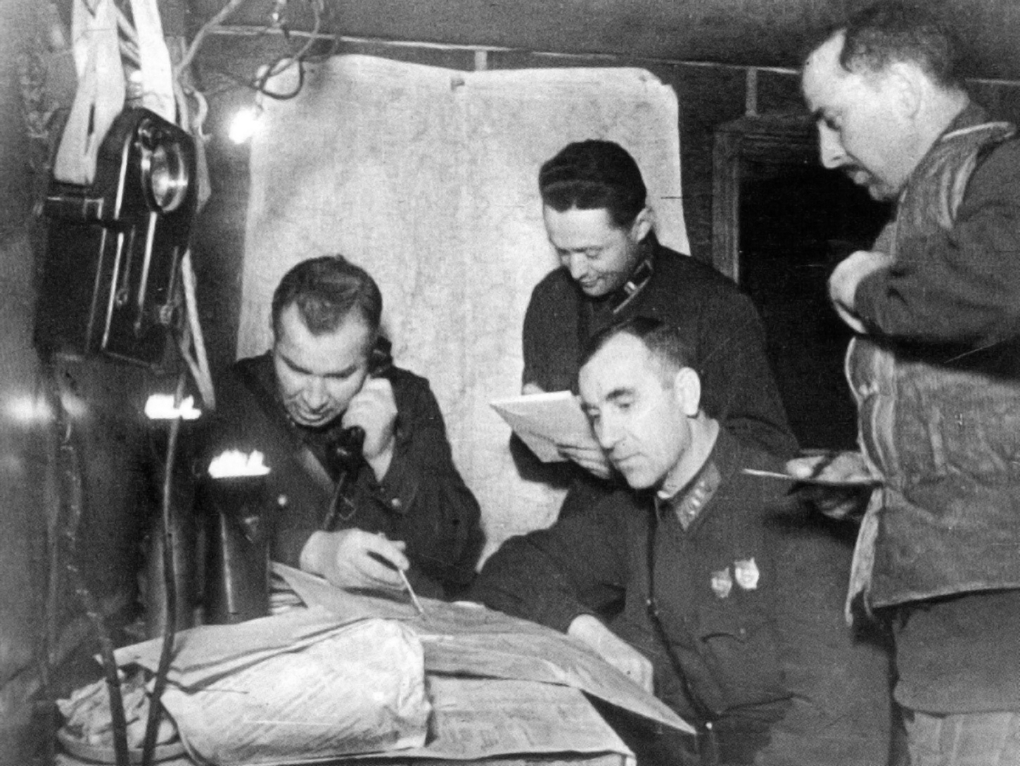 Командний пункт 95-ї СД в Сталінграді. Зліва направо: командир дивізії полковник В.А.Горишній, комісар дивізії полковник І.А.Власенко (сидить), нач. першого відділу майор Г.Г.Слуцький (стоїть), нач. артилерії дивізії полковник А.А.Далакішвілі.